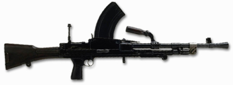 Ein LMG Typ 99.